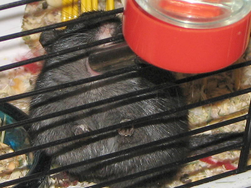 Drinking gerbil